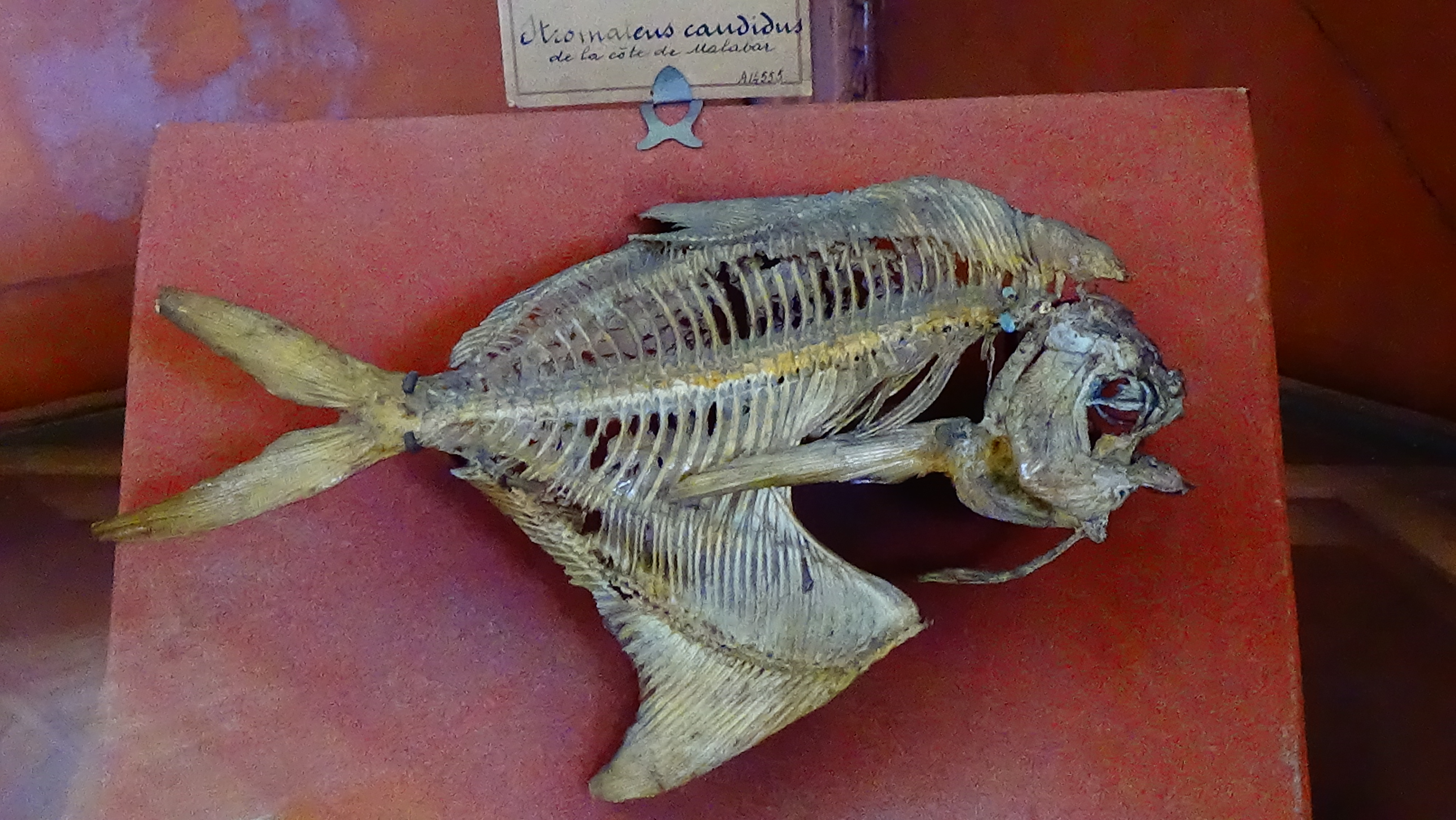 Pampus chinensis - (Staumateus candidus) - squelette mnhn Paris